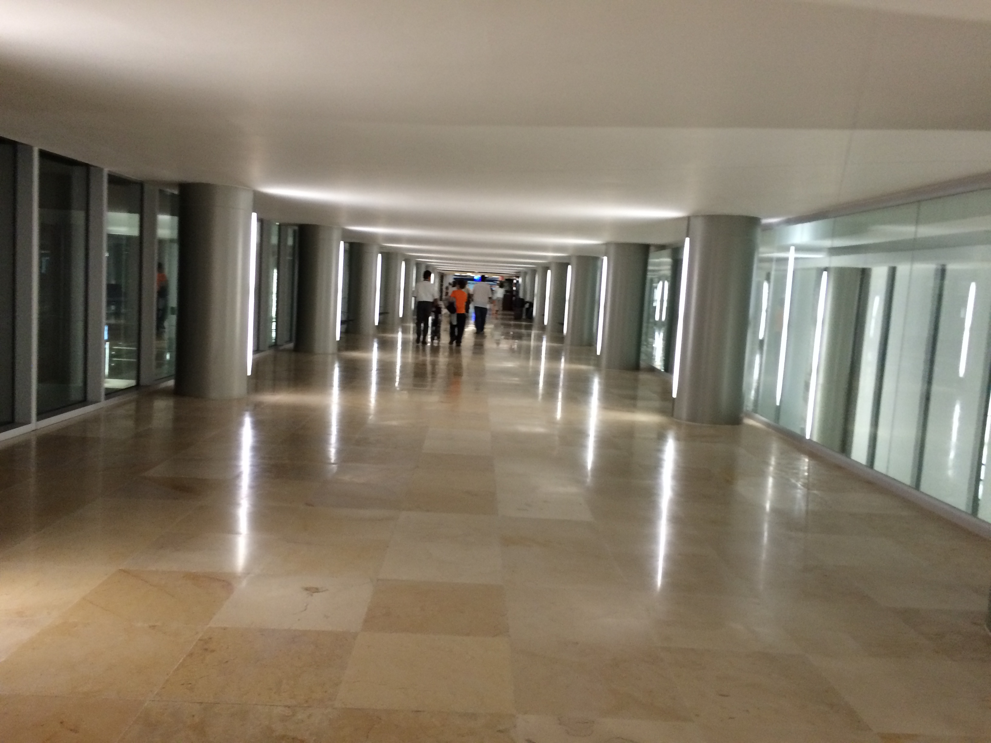 Planta baja del Aeropuerto de Mérida.